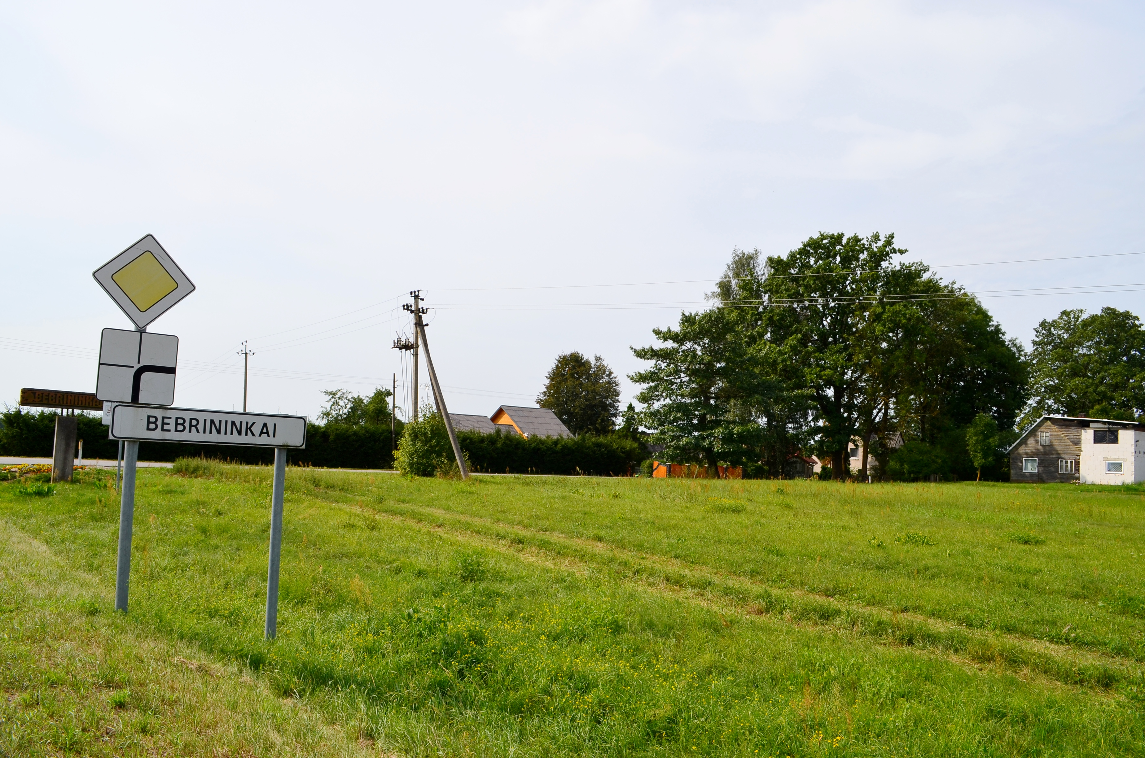 Bebrininkai, Vilkaviškio raj.